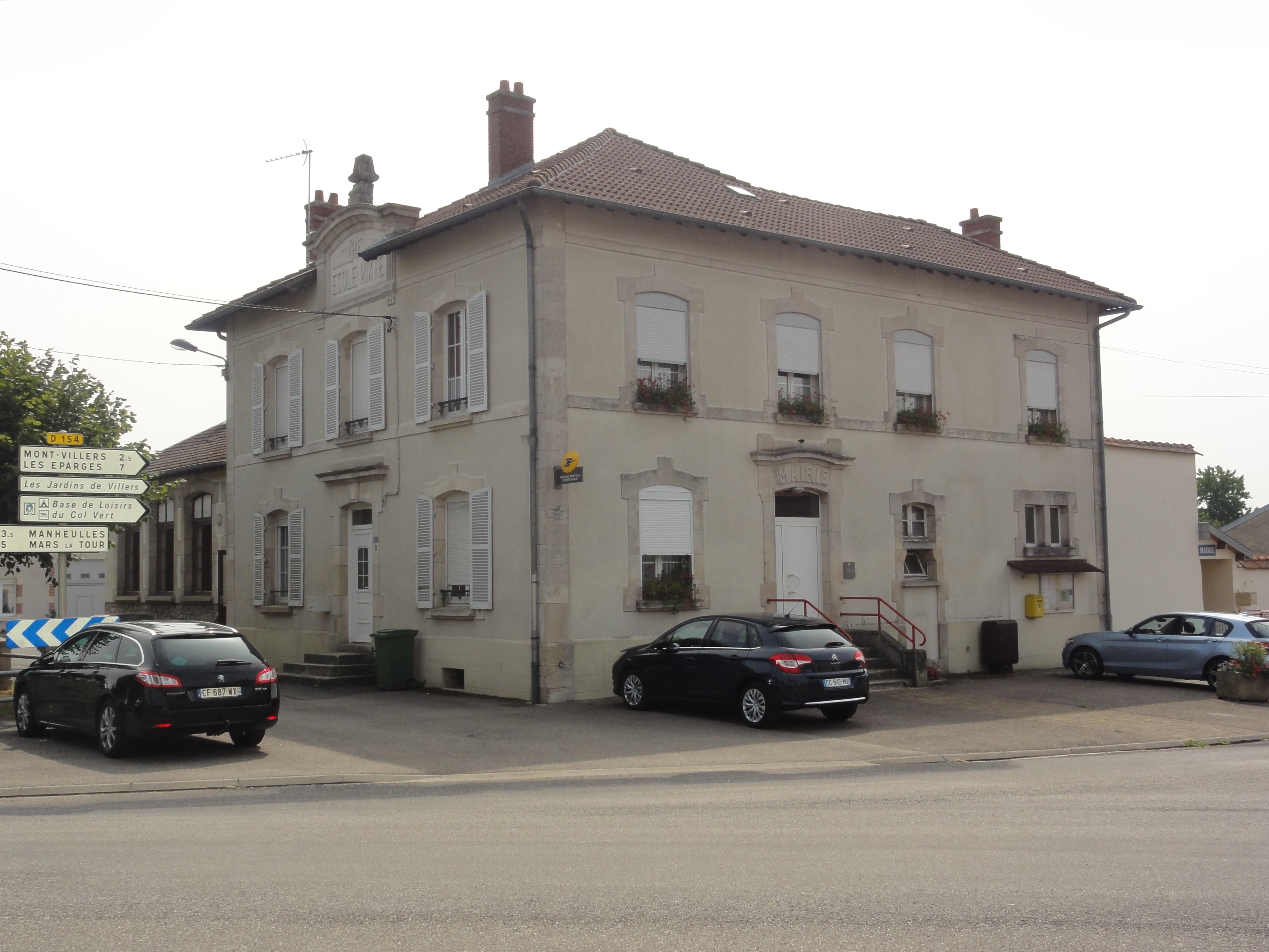 Haudiomont (Meuse) mairie-école